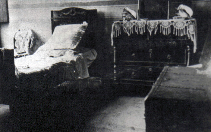 O quarto onde Gino Meneghetti, criminoso italiano radicado no Brasil, escondia o produto de seus roubos. Rua Joli, São Paulo, 1926